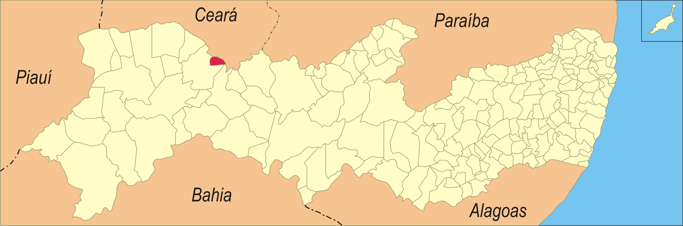 Localização da cidade em Pernambuco